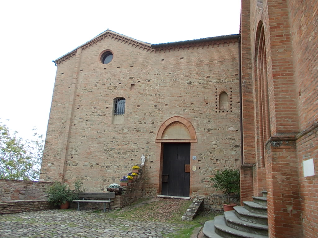 Monteveglio l'Abbazia